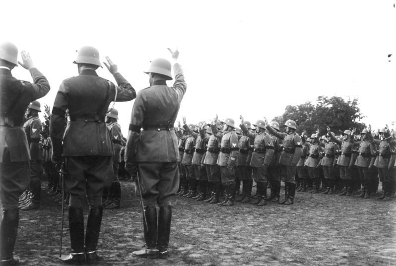 Die feierliche Vereidigung der Reichswehr auf den neuen Reichspräsidenten Adolf Hitler auf dem Kasernenhof der Wachtruppe in Berlin 1934 Offiziere und Mannschaften leisten den feierlichen Eid durcherheben der rechten Hand. Die Reichswehr trägt Trauerflor für den verstorbenen Reichspräsidenten.